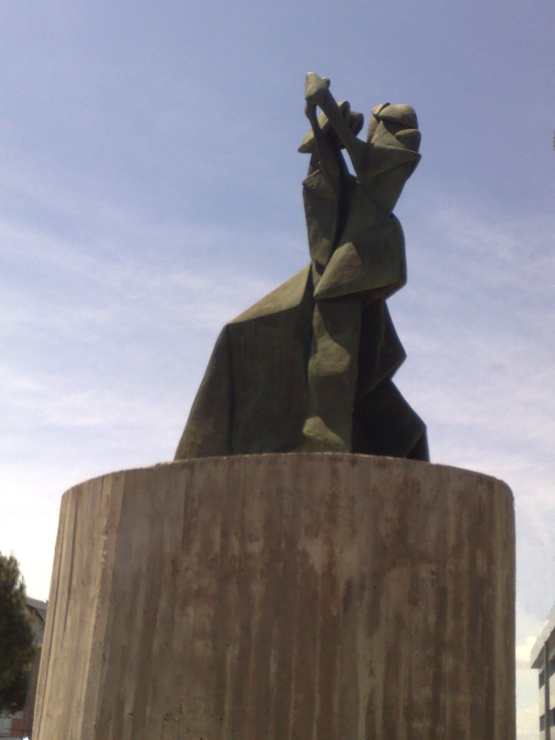 Torrelodones. Monumento escultórico "La Verbena", situado en Av. del Castillo de Olivares.